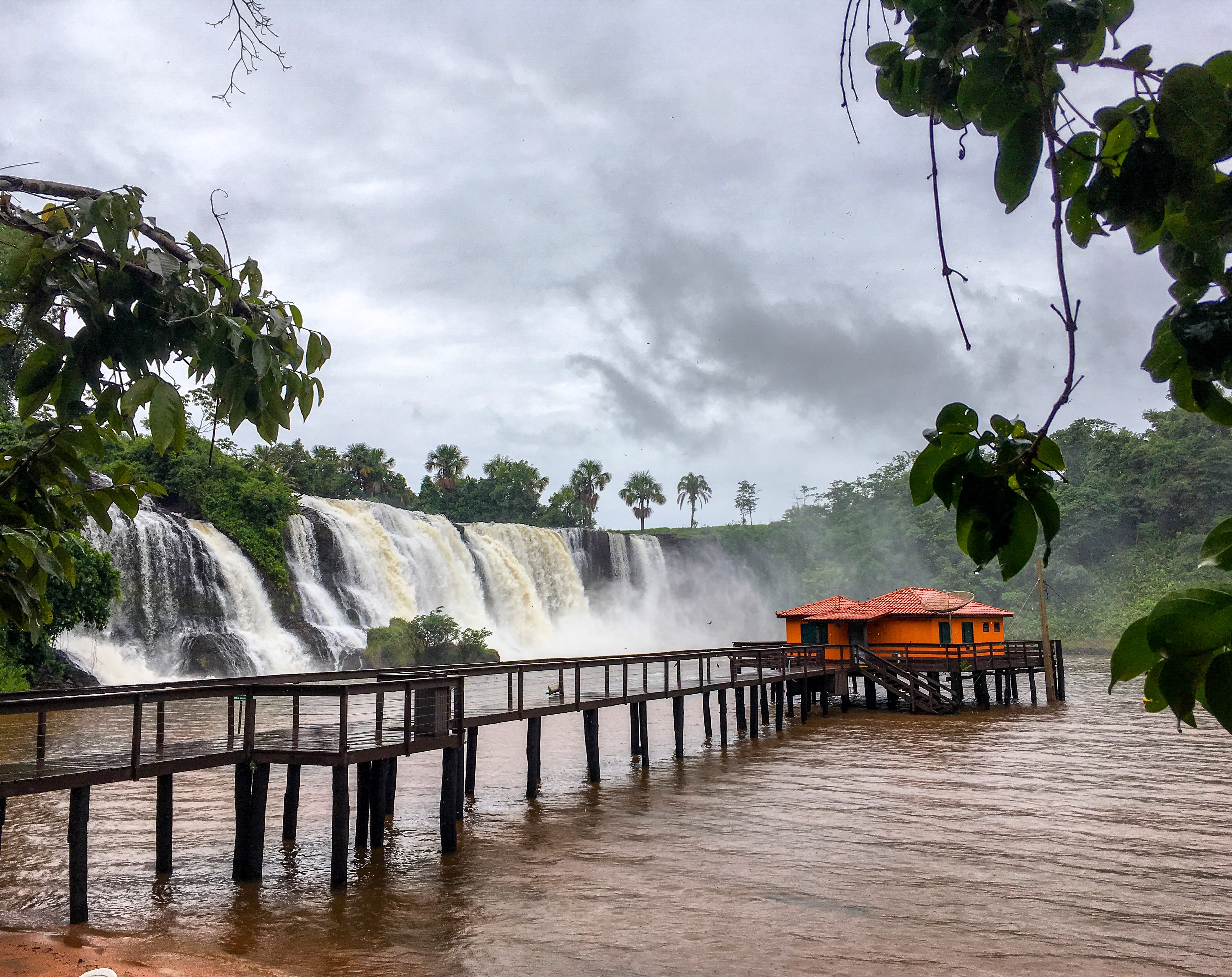 Cachoeira Salto das Nuvens em Tangará da Serra, MT. Lugar belíssimo para apreciar a beleza das cachoeiras brasileiras e passar o dia relaxando.